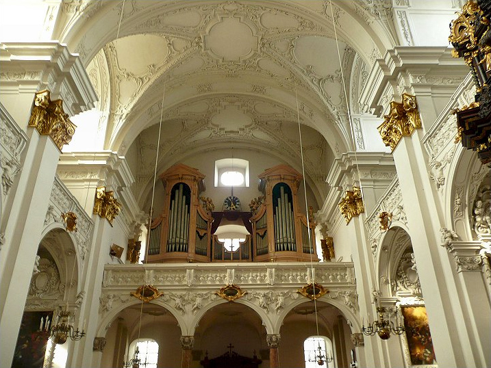 Brucknerorgel in der Ignatiuskirche (Alter Dom) in Linz